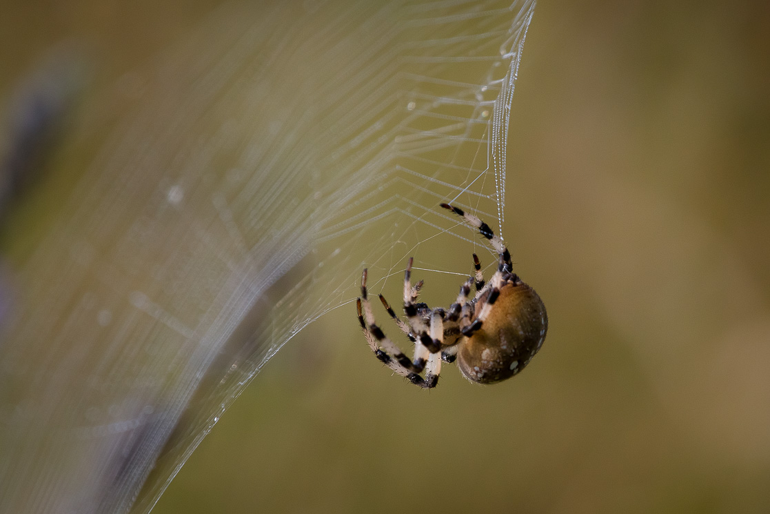 Завершающий этап строительства новой паутины